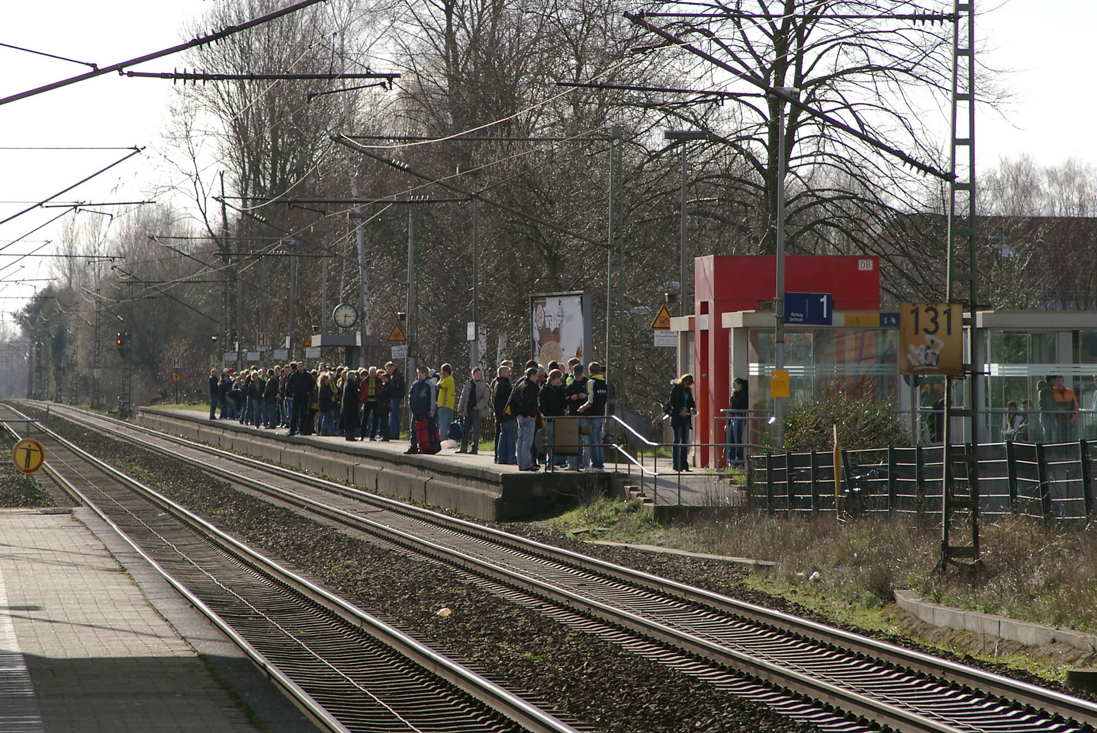 Haltepunkt Kamen-Methler an der Bahnlinie Hamm-Dortmund